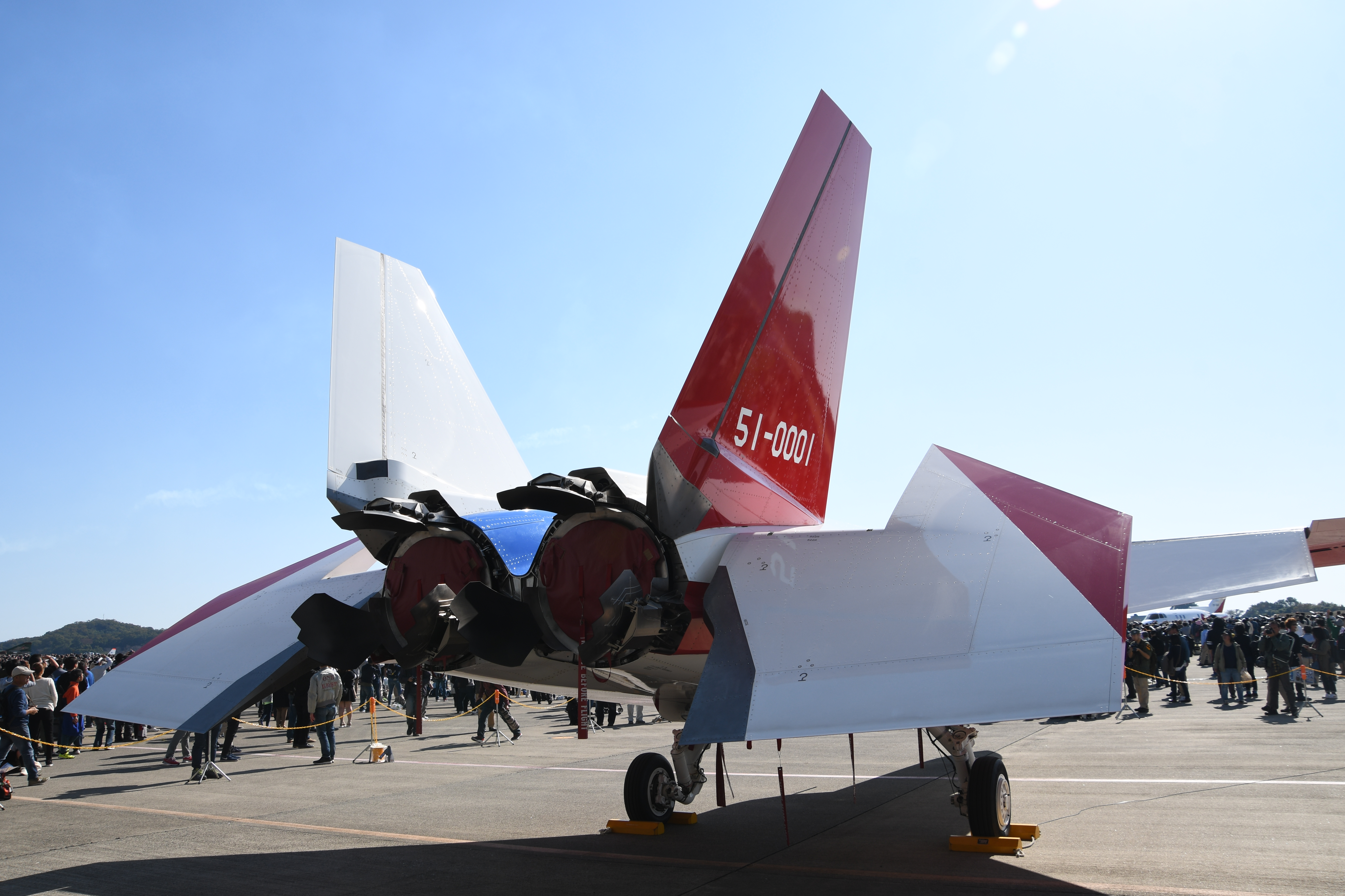 先進技術実証機 X-2 右後部。2019年11月10日 航空自衛隊岐阜基地にて。